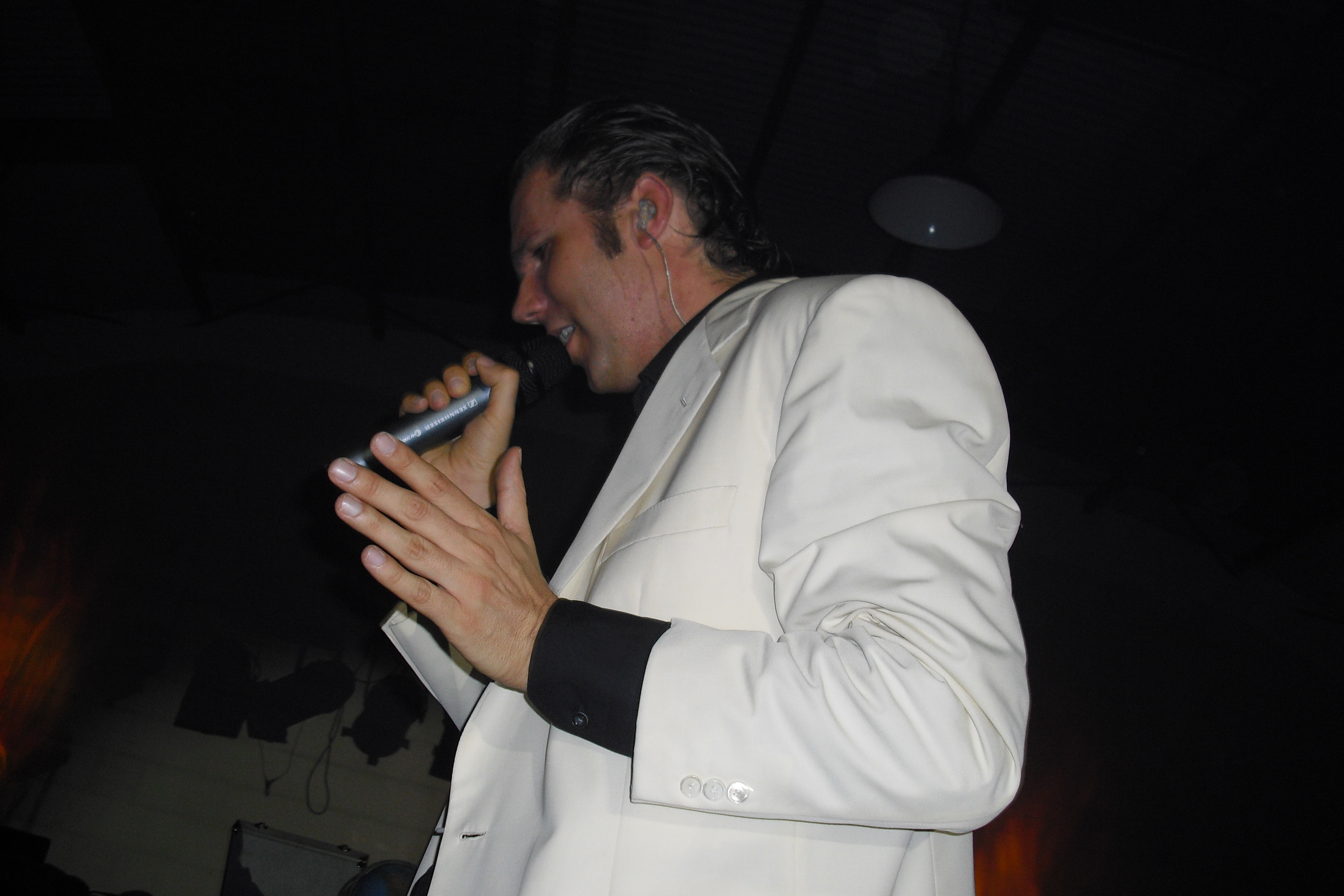 Alexander Marcus am 19.09.2009 in Merseburg